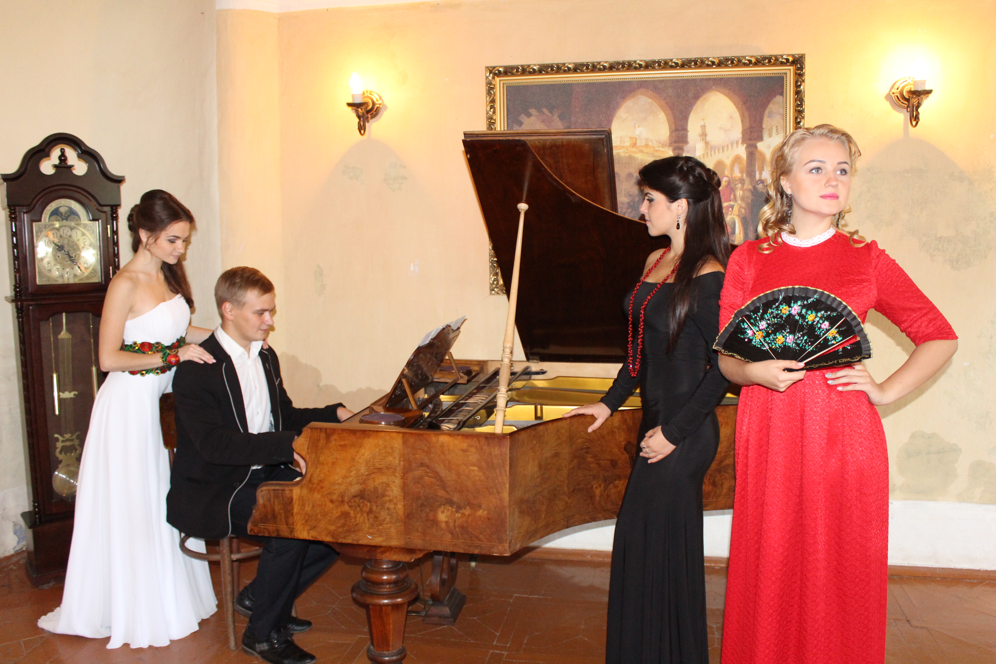 Виступ акторів студії історичних реконструкцій у ДІКЗ "Самчики"